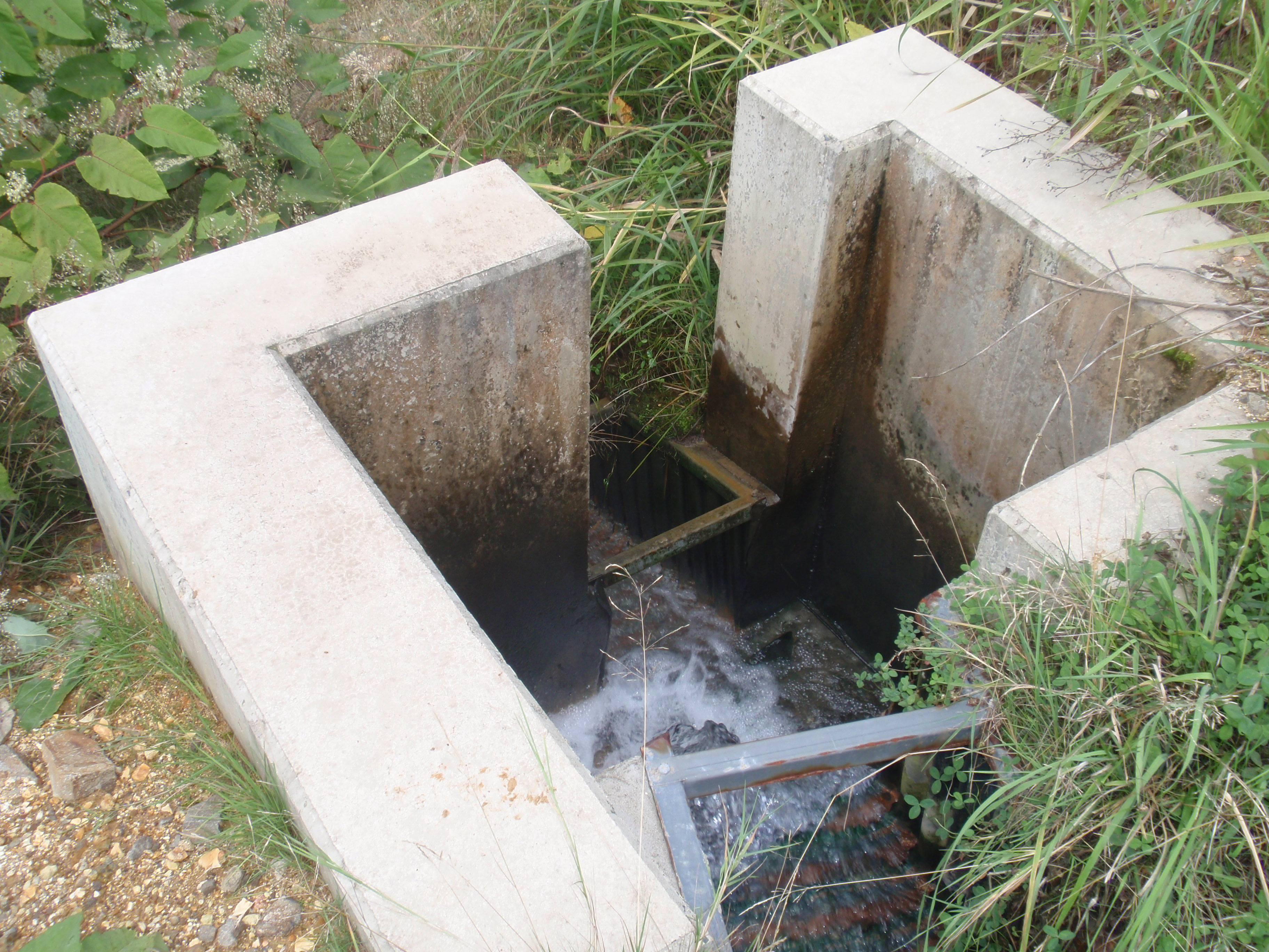 澄川温泉跡地。排水溝を流れる温泉水。